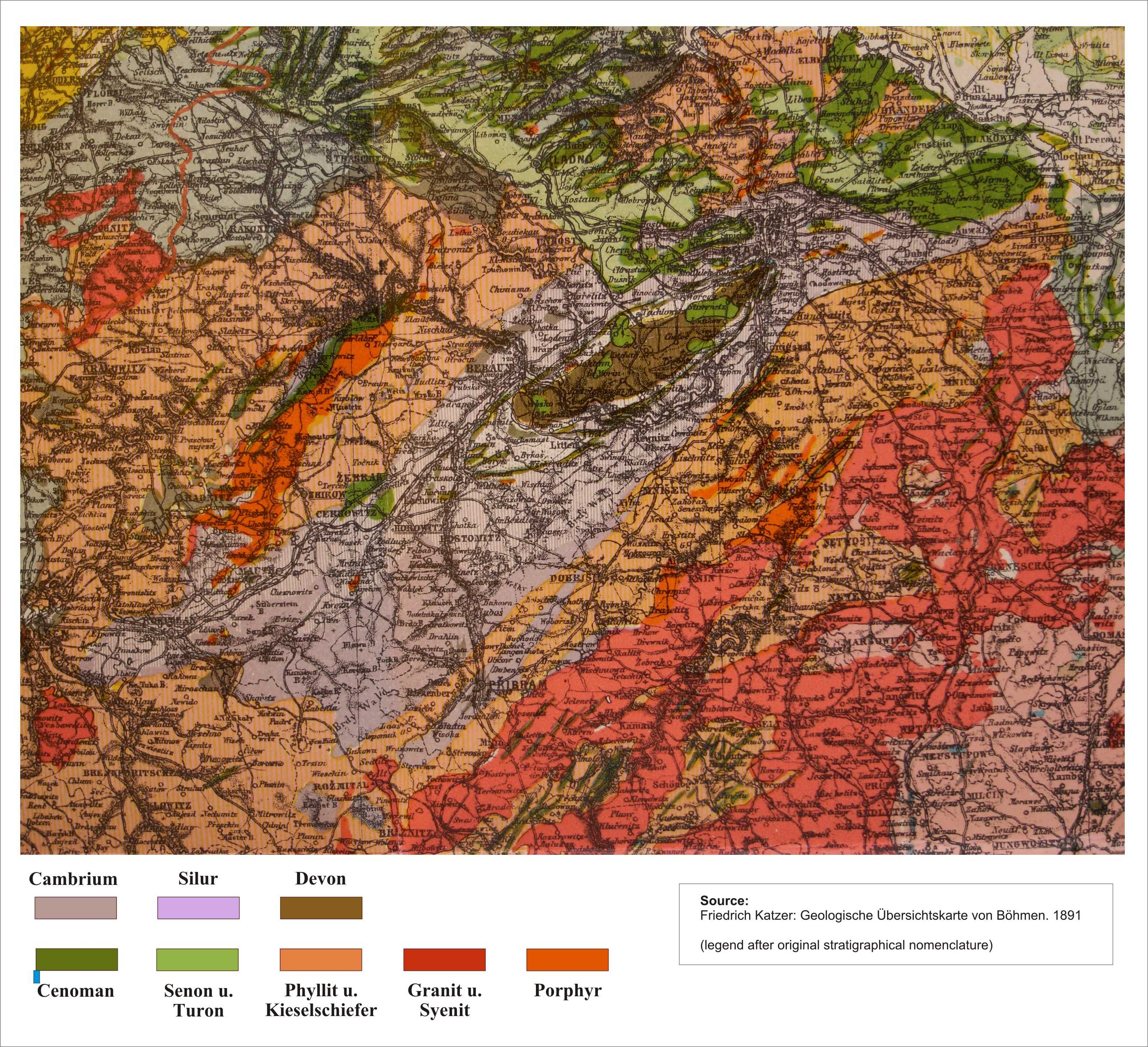 Friedrich Katzer: Geologische Übersichtskarte von Böhmen (Detail)